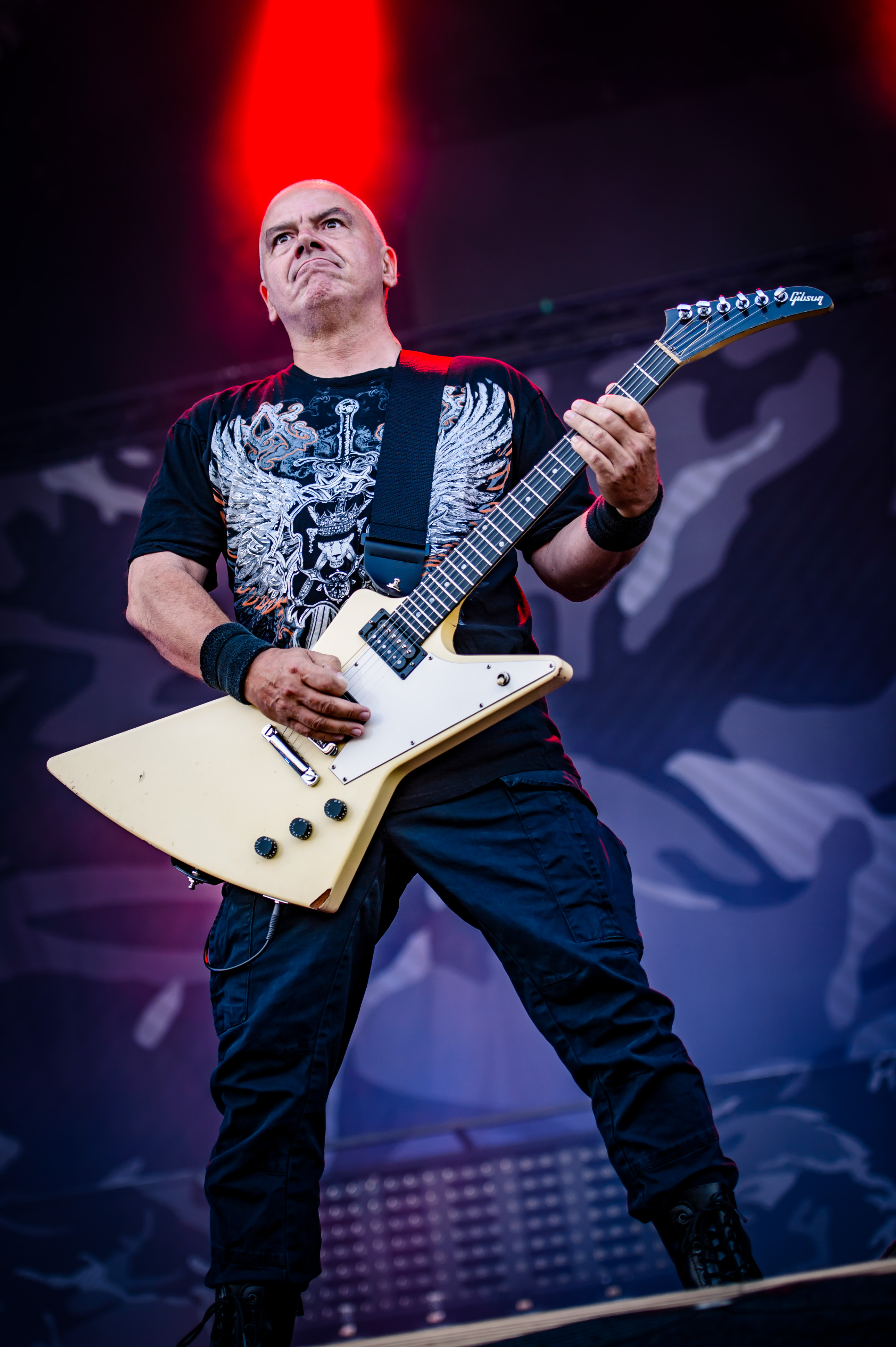 'Summer Breeze Festival 2018; Dinkelsbühl': 'Dirkschneider'